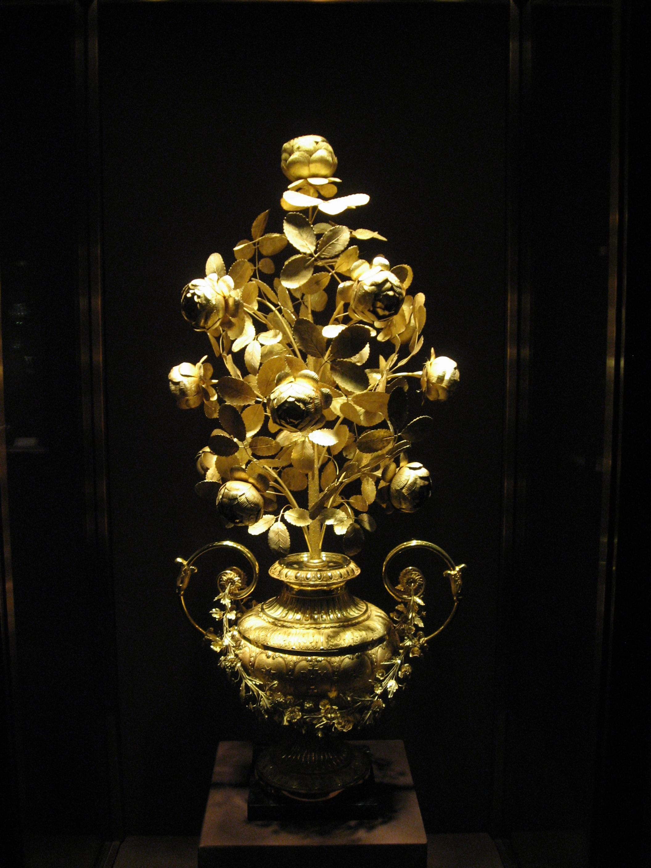 Goldene Rose. Giuseppe und Pietro Paolo Spagna. Rom, um 1818/19. Gold, verde antico. SK Inv. Nr. XIV 149.